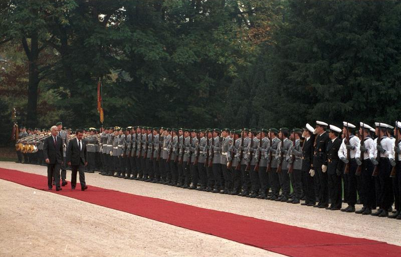 11.-15.10.1986 Besuch des Präsidenten von Guatemala, Lic. Marco Vinicio Cerezo Arévalo, und seiner Frau Lic. Raquel Blandon de Cerezo in der Bundesrapublik Deutschland. 11.10.1986- Begrüßung mit militärischen Ehren durch Bundespräsident Richard von Weizsäcker vor dem Bundespräsidialamt.